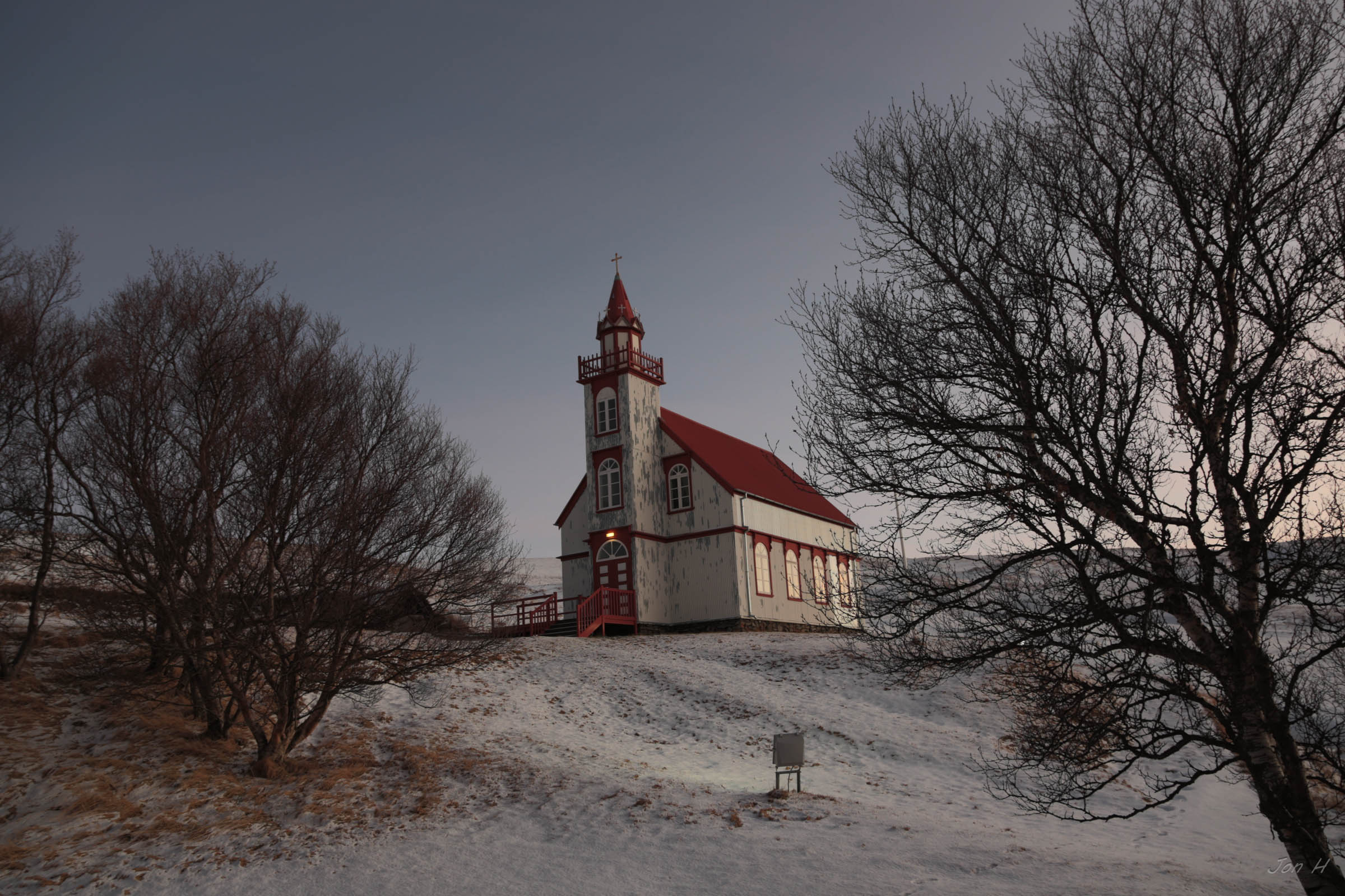 Hlíðarendakirkja